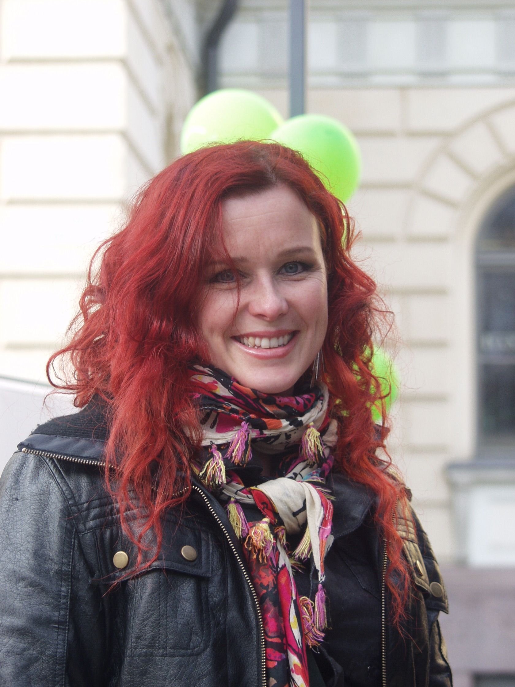 Kirsi Ylijoki Vihreiden vaalimökillä Kolmen sepän patsaalla huhtikuussa 2011